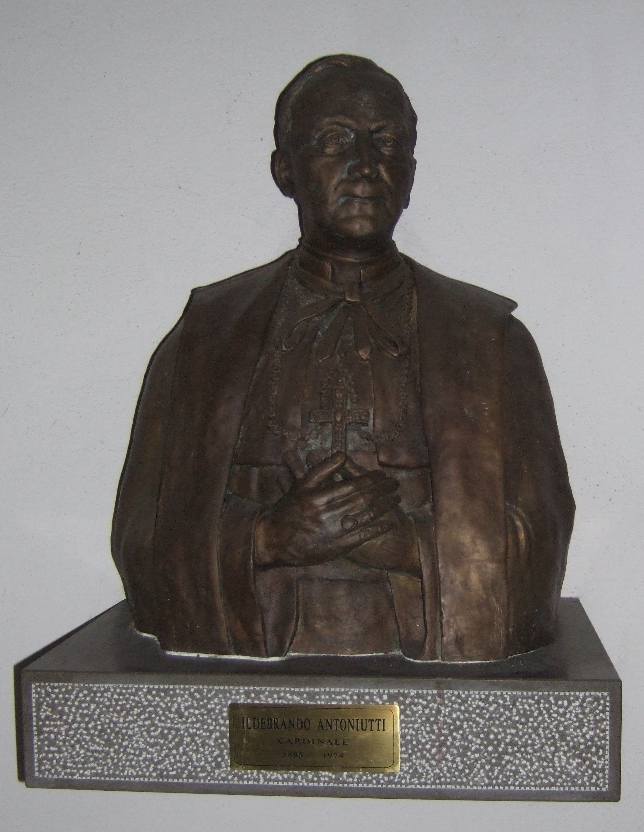 Nimis (UD) - Chiesa dei santi Gervasio e Protasio Busto del cardinale Antoniutti